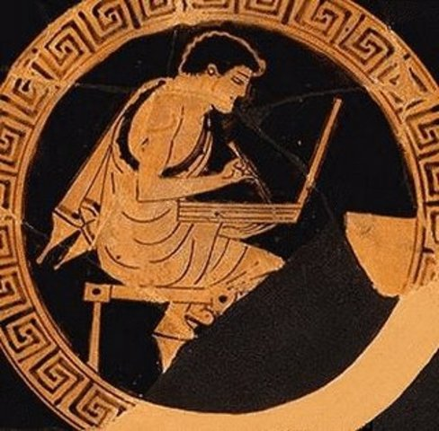 Kylix attico con figura rossa di ragazzo seduto che scrive. Provenienza da Orvieto, Etruria